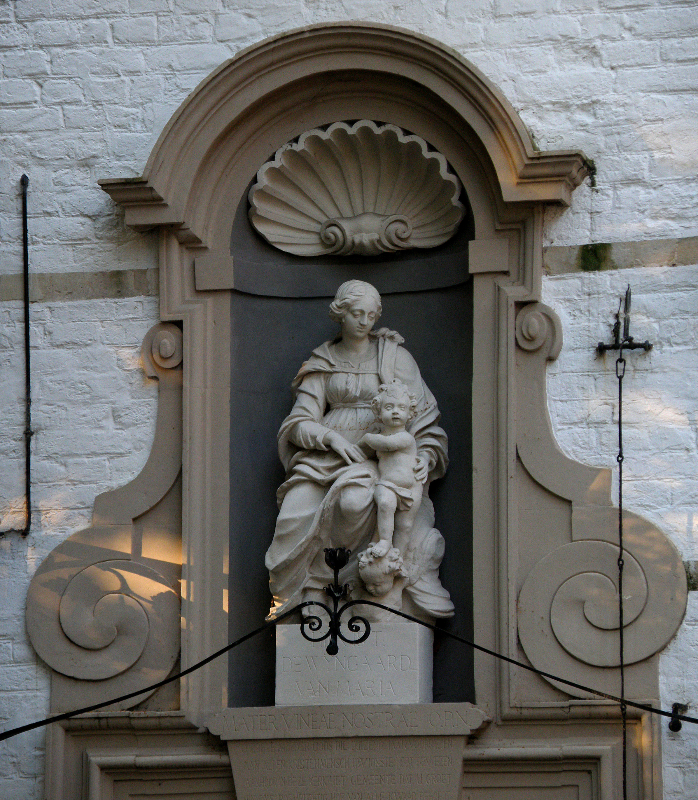 Brugge, Begijnhof. Woning van de grootjuffrouw of kapittelhuis (omvat infirmerie en huiskapel). Mariabeeld in gevelnis.